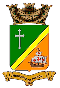 Escudo Oficial del Municipio de Rincón, según aprobado por la Legislatura Municipal con la Ordenanza Num.4 Serie 1982-1983